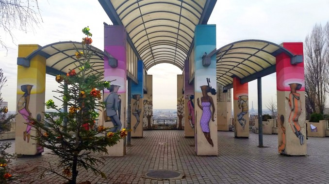 Art urbain de Julien Malland dit "Seth" sur le belvédère au parc de Belleville (20e arrondissement de Paris). Vue d'ensemble.